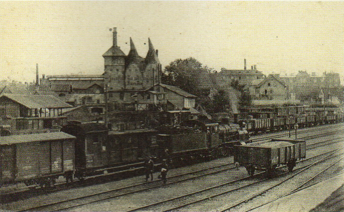 L'ancienne gare marchandises de Strasbourg-Koenigshoffen vers 1900; Image numérisée. Carnets de ville, document conçu et réalisé par la Direction de l'Urbanisme, de l'aménagement et de l'habitat. Ville de Strasbourg 2013.